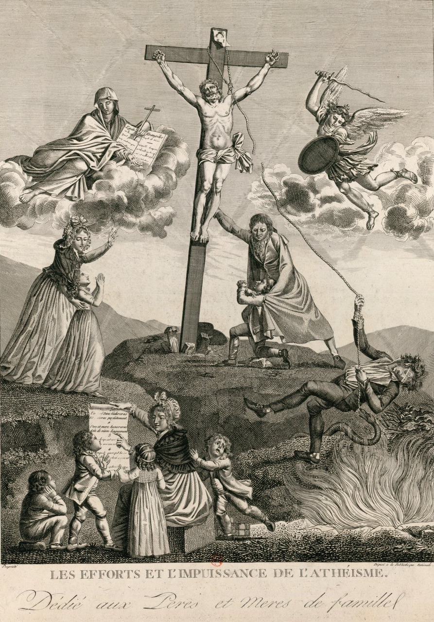 Efforts et l'impuissance de l'athéisme : sujet utile à l'edification de la jeunesse, dédié aux peres et meres de famille. Stich, Paris (1797).